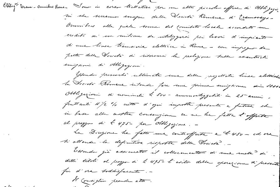 stralcio da verbale della Banca Commerciale Italiana